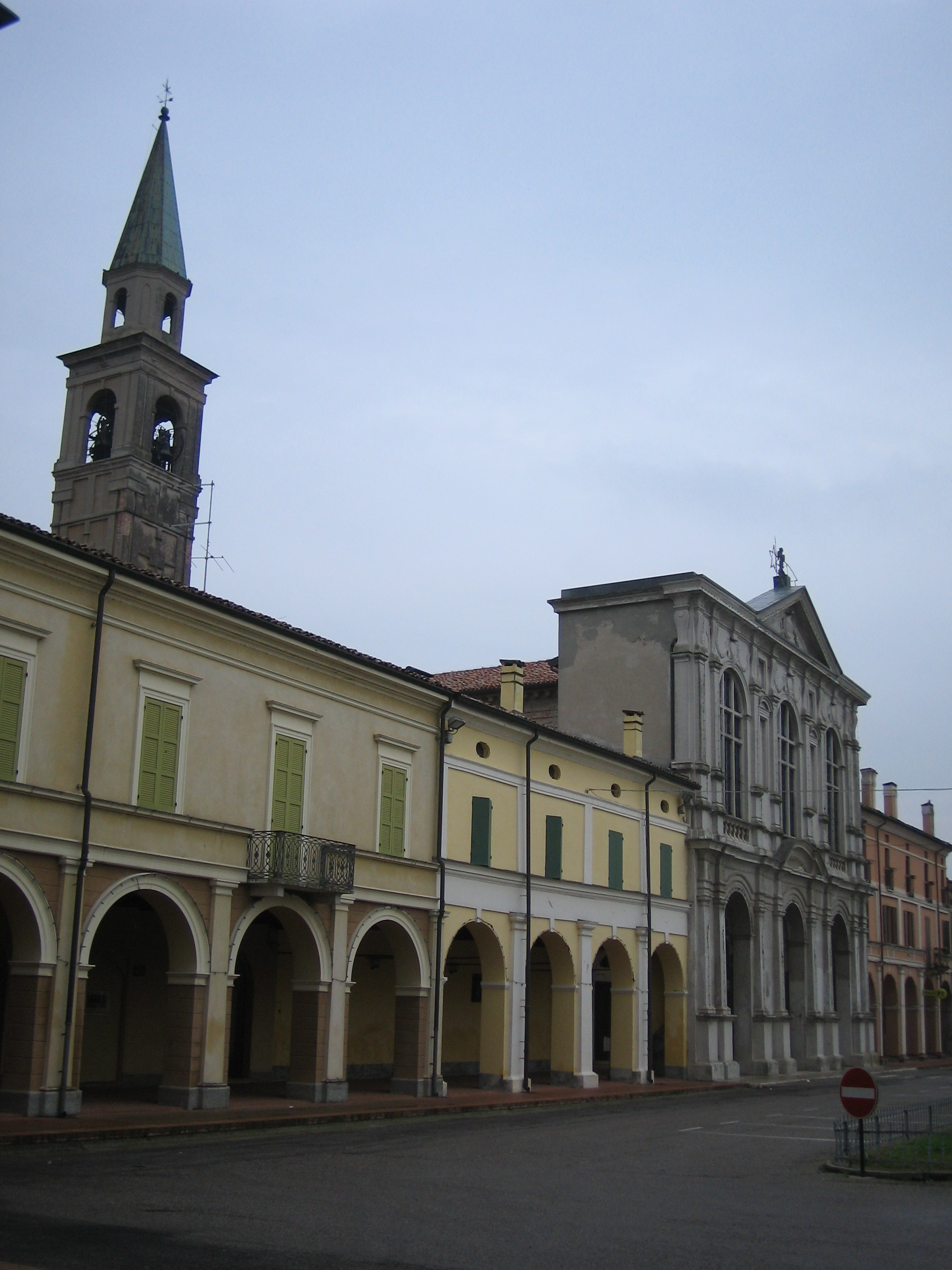 S. Felicita Pomponesco